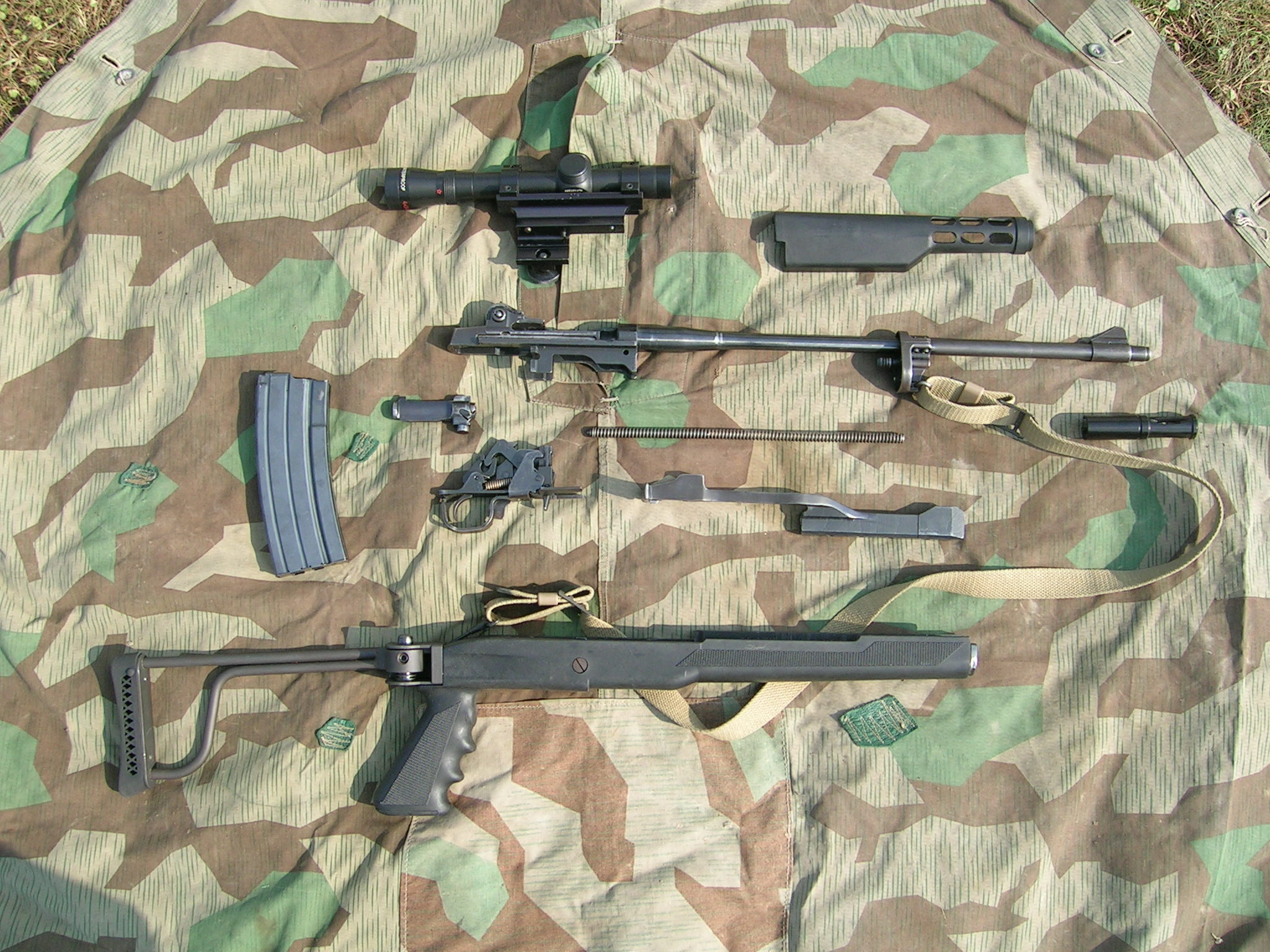 Ruger Mini 14, zerlegt (von oben links nach unten rechts): Zielfernrohr mit Montage, Handschutz, Lauf mit Systemgehäuse und Gasumlenkung, Drehverschluss, Rückstossfeder, Mündungsfeuerdämpfer, Magazin, Abzugsmechanismus, Gasblock, Klappschaft mit Schulterriemen. Foto: Snoweater